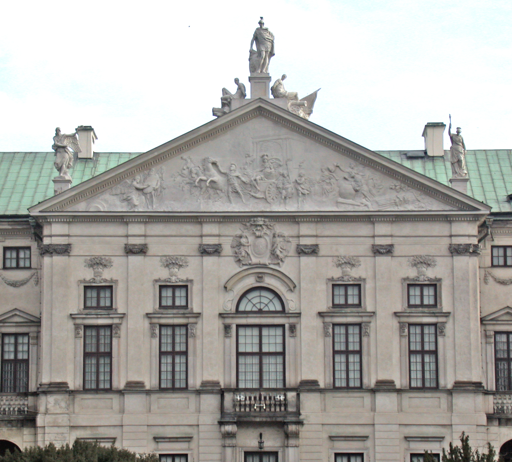 Varsavia, Palazzo Krasiński (Pałac Krasińskich) facciata sui Giardini Krasiński (Ogród Krasińskich), particolare del frontone.